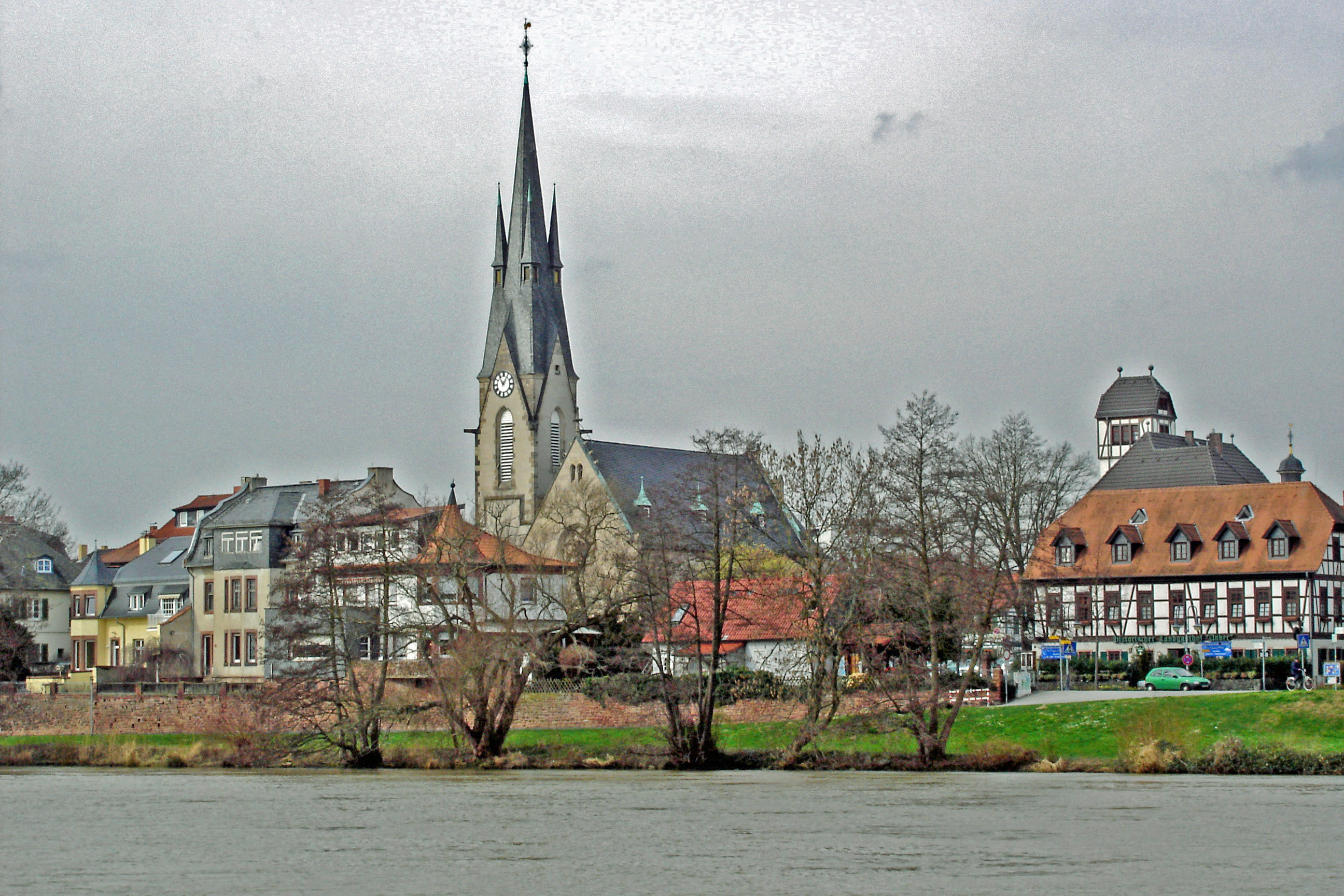 evangelische Friedenskirche an der Philipsruher Allee in Hanau